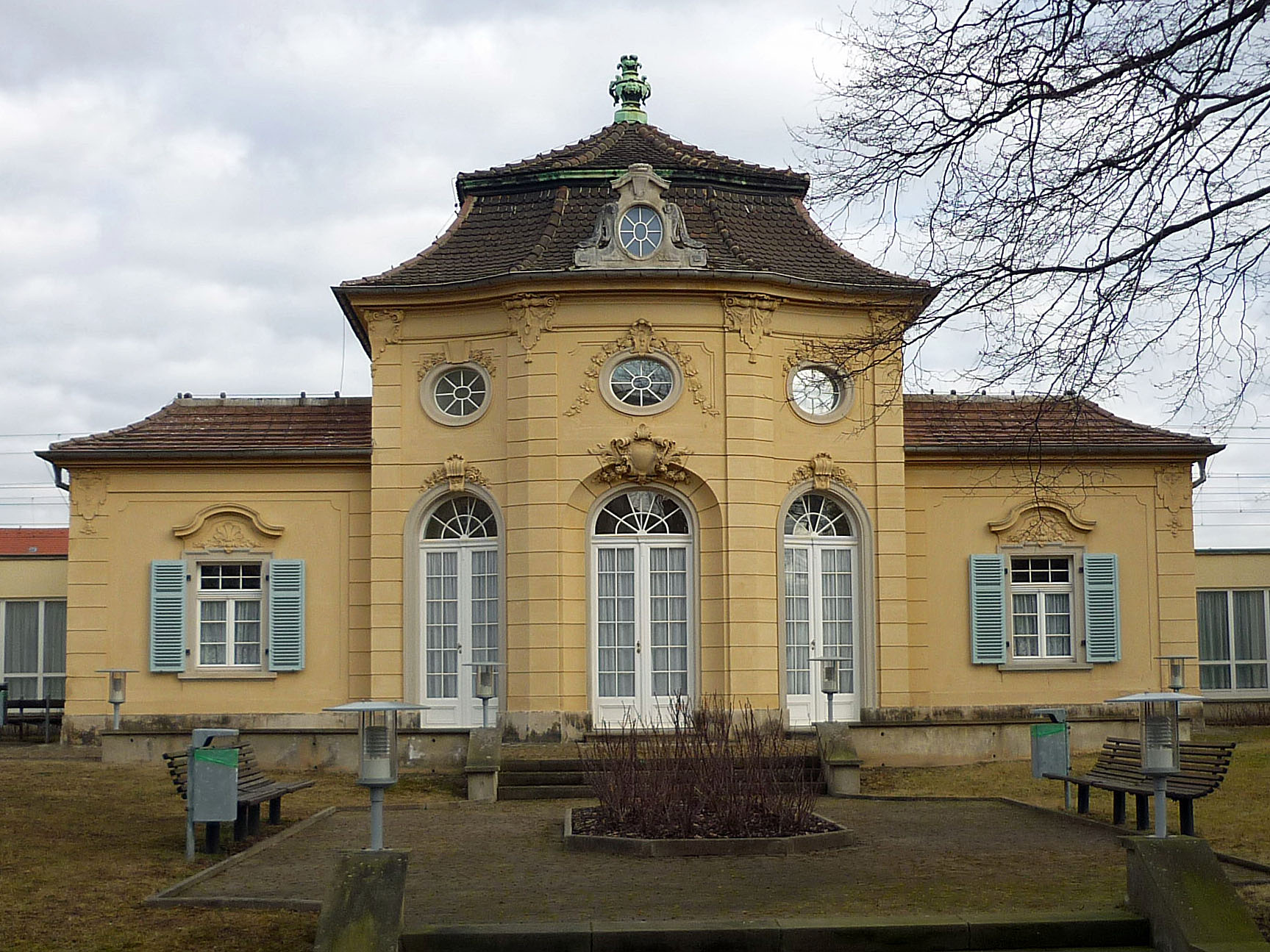 Pavillon der ehem. Königlichen Villa in Dresden-Strehlen